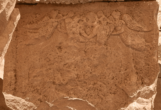 Kastell Gheriat el-Garbia - Das Bildprogramm mit Siegesgöttinnen und Adlern über dem östlichen Seitentor der Porta praetoria (2006). Der auf dem Kopf liegende Stein wurde zur besseren Anschauung umgedreht.